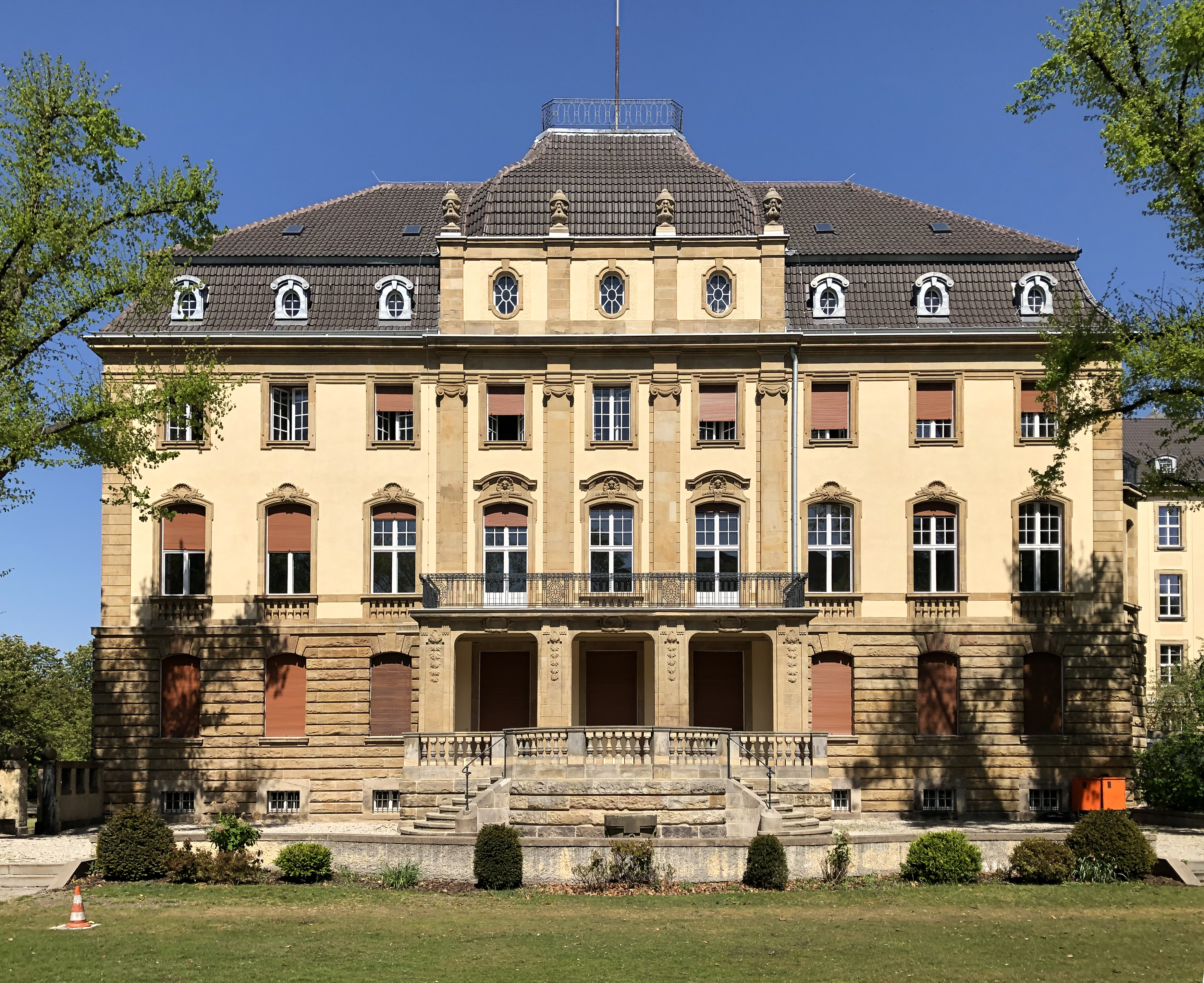 Präsidentenschlösschen, Gartenseite, Cecilienallee 1, Düsseldorf-Pempelfort